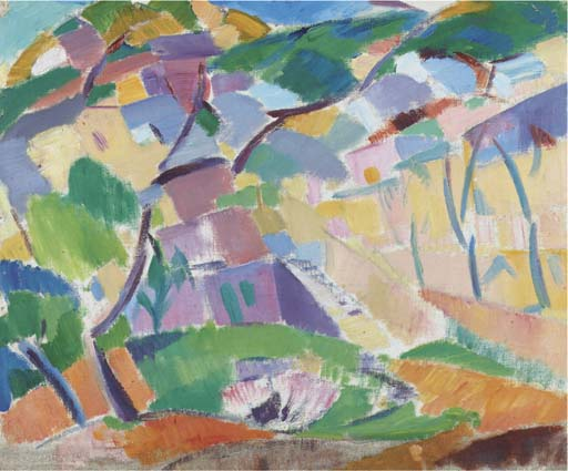 Mallorca. Oil on canvas. 38 x 45 cm.